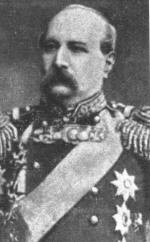 Avrami Aslanbegov (Ibrahim bey Aslanbeyov)